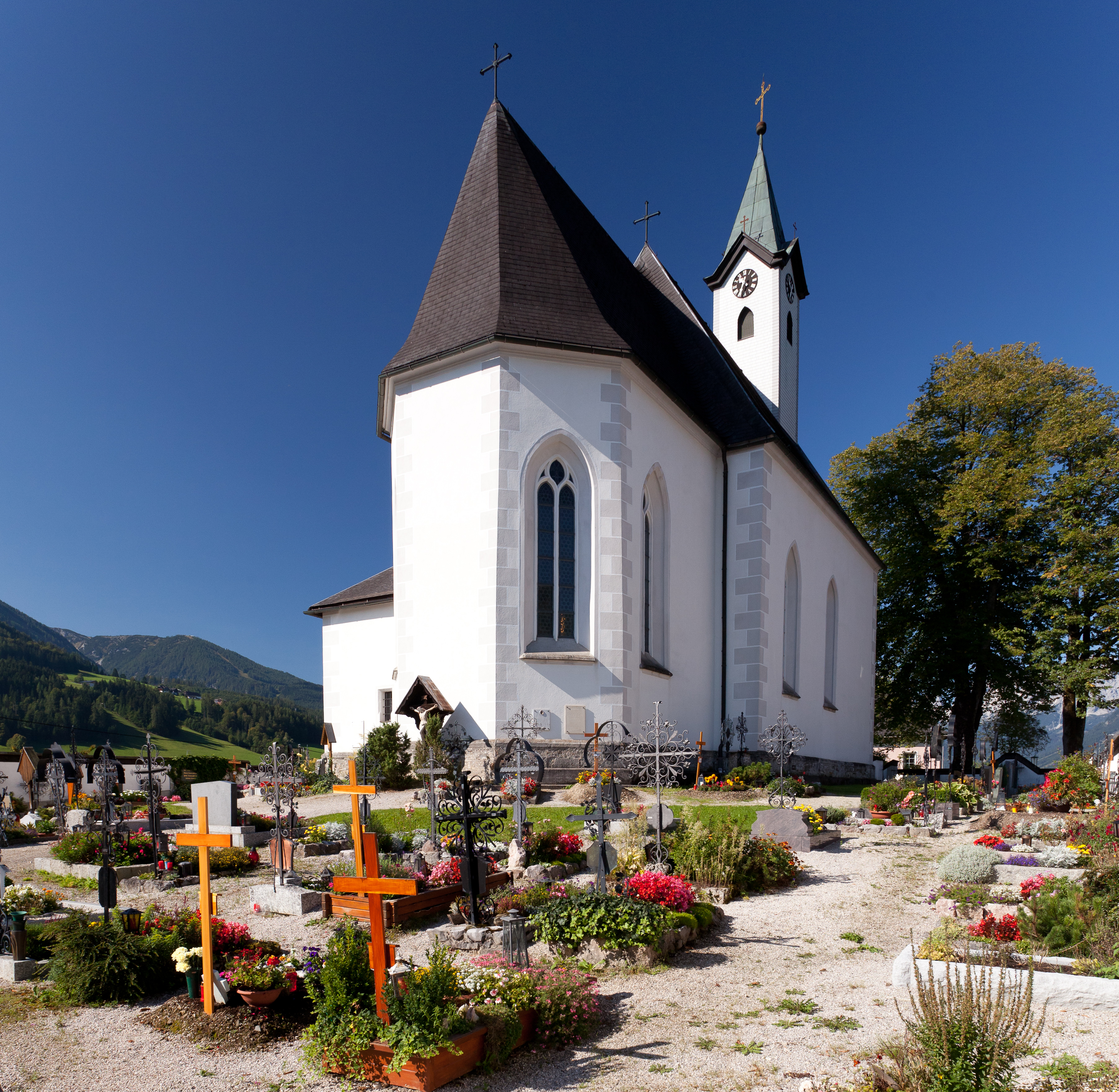 Kath. Pfarrkirche hl. Leopold und Friedhof